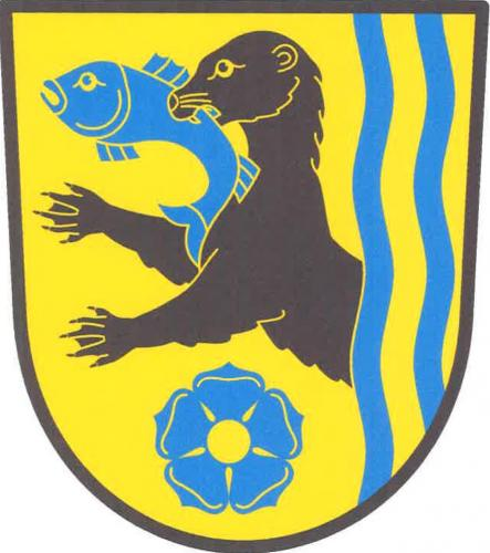 Vydří znak